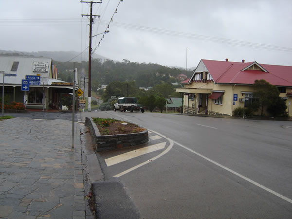 Herberton, Queensland, Australie; la grand rue